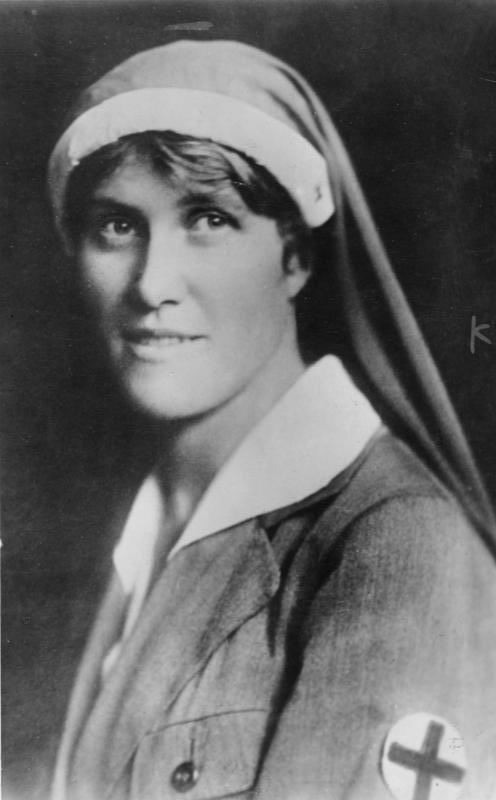 Elsa Brandström Elsa Brandström, die während und auch noch nach dem Weltkriege ihre charitative Arbeit bei den Kriegsgefangenen in Sibirien verrichtete. In Deutschland ist sie unter dem Namen "Engel von Sibirien" bekannt. 1929 [Porträt Elsa Brandström] Abgebildete Personen: Brandström, Elsa Dr.: Rote-Kreuz-Schwester in Sibirien, Schweden